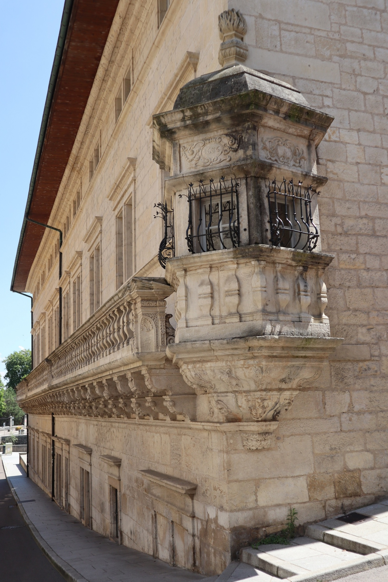 Extérieur de l'Hôtel-Dieu de Dole (39).